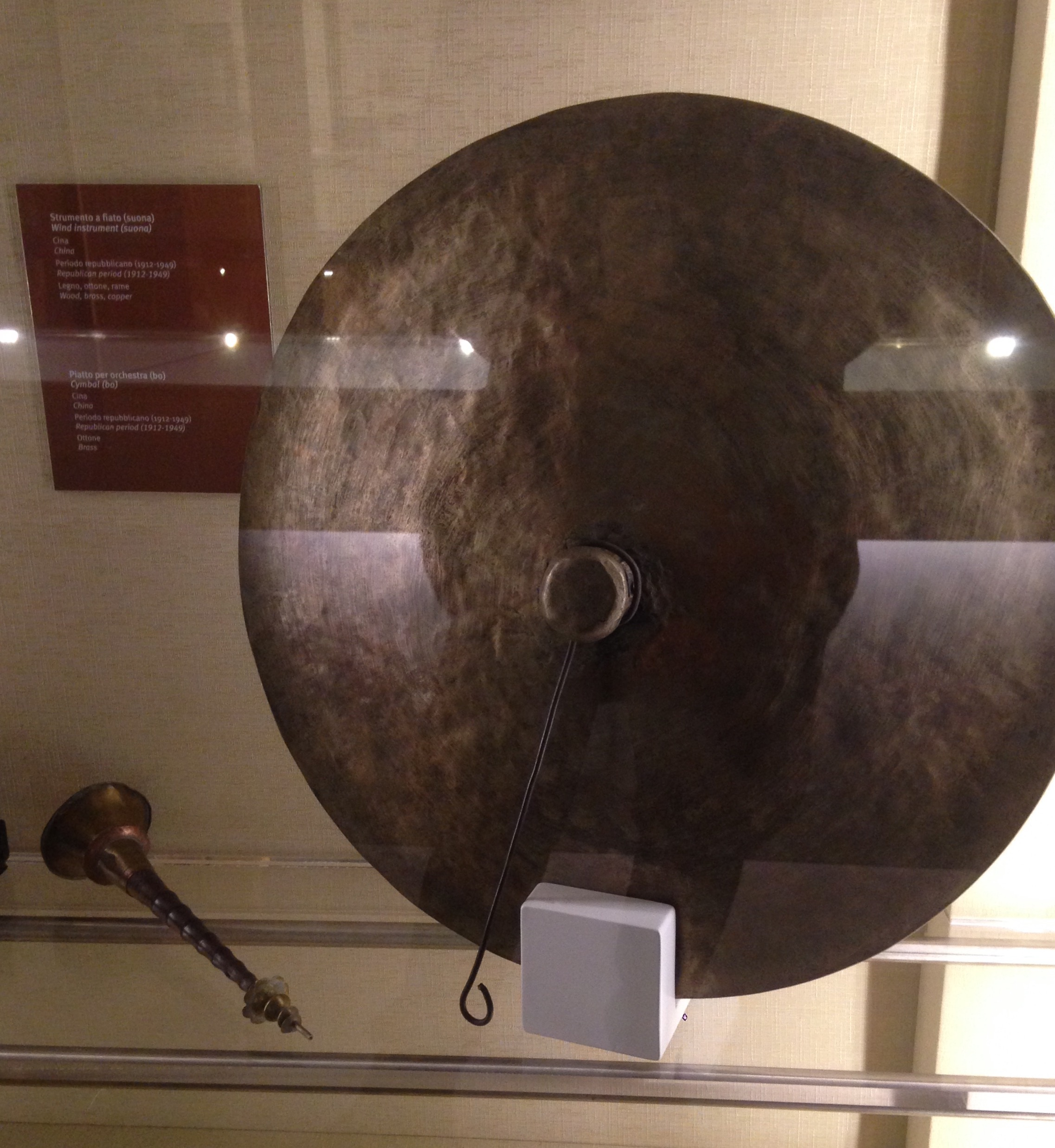 Strumenti a fiato e percussione della Cina nei primi del novecento.